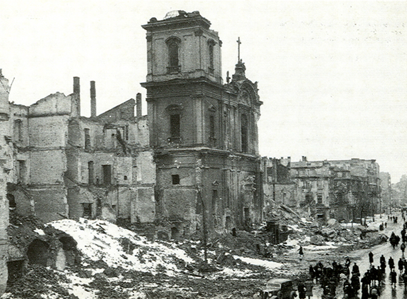 Kościół św. Krzyża na Krakowskim Przedmieściu w Warszawie